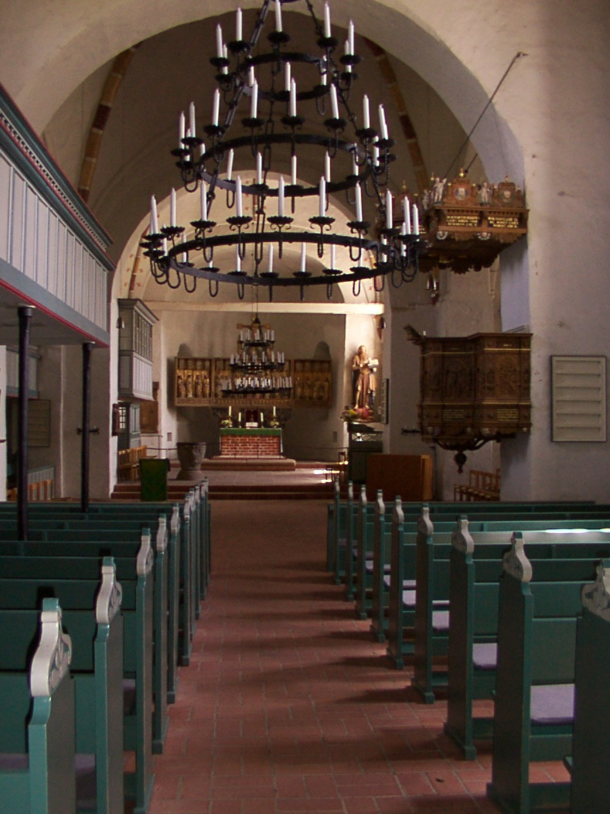 Mittelschiff der St. Johannis-Kirche in Nieblum auf Föhr mit Blick auf den Altar